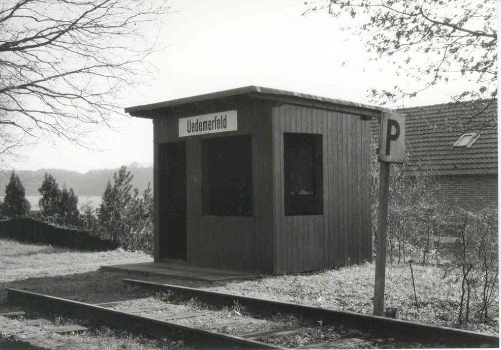 Der ehemalige Haltepunkt "Uedemerfeld" an der Boxteler Bahn